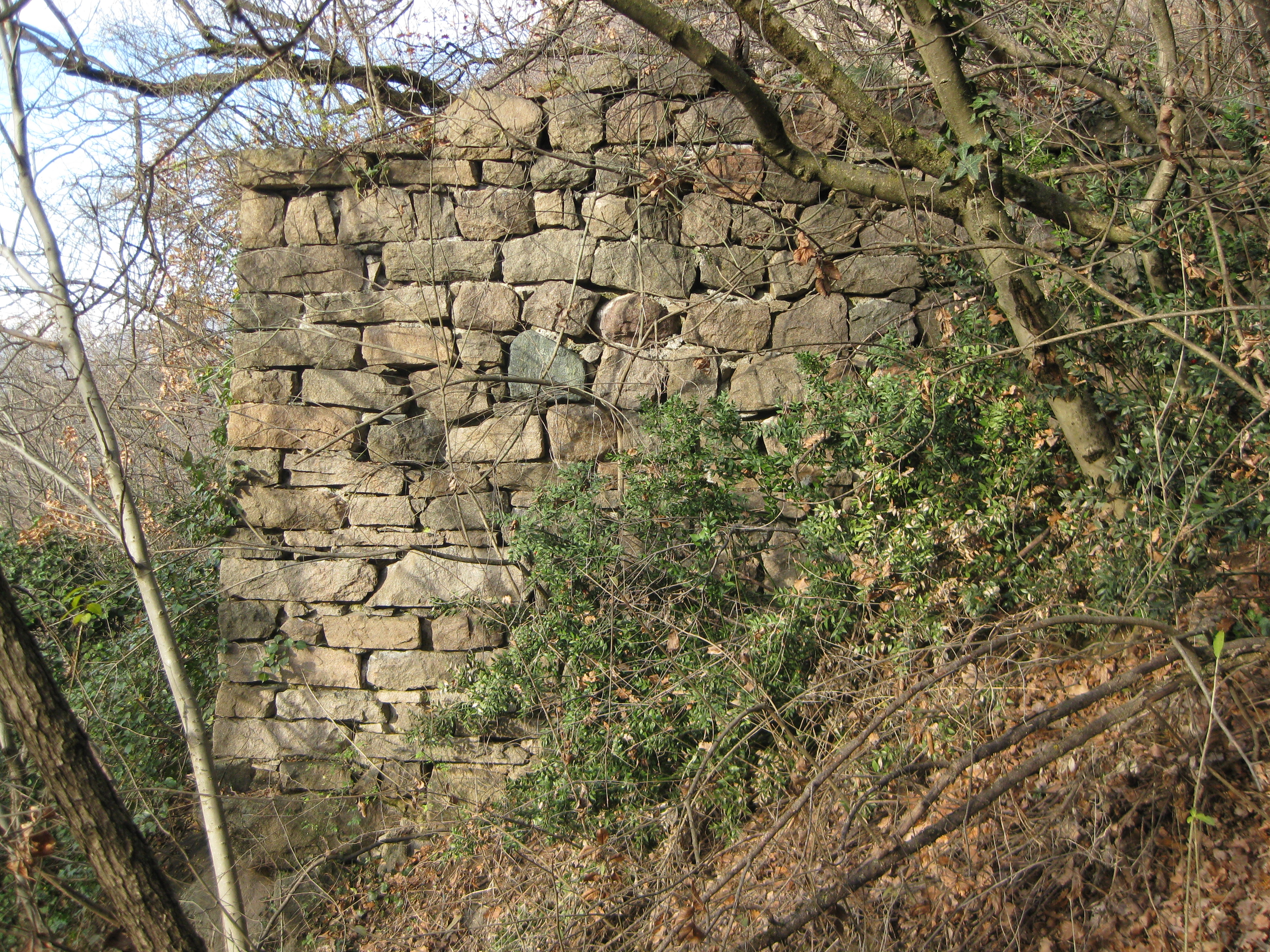 Der Tinzlturm (auch Turm an der Tinzlleiten oder Dinzlleiten genannt) ist eine heute schwer zugängliche Ruine bei St. Jakob in der Gemeinde Leifers in Südtirol. Geschichte und früherer Name des Gemäuers sind unbekannt, es scheint sich jedoch um einen Turm gehandelt zu haben, der einst die Kreuzung der alten Straße von Leifers nach Bozen mit dem inzwischen verwachsenen Steig zum hoch über dem Etschtal gelegenen Weiler Seit bewachte. Die Überreste des mittelalterlichen Gemäuers stehen heute unter Denkmalschutz. Dieses Bild zeigt einen Blick auf die südseitige Mauer des Turms.